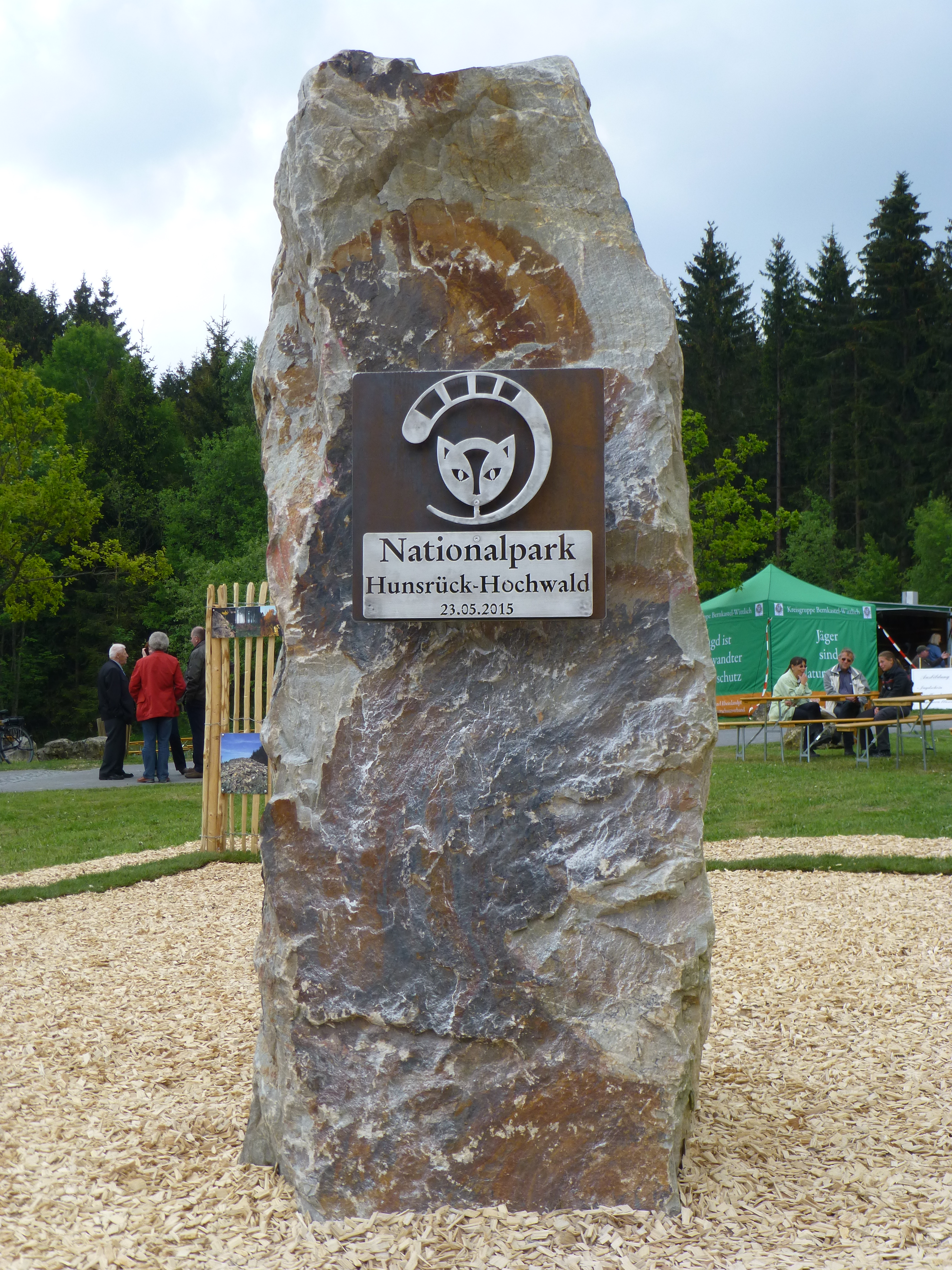 symbolischer Grundstein des Nationalparks Hunsrück-Hochwald am Tag der Eröffnung